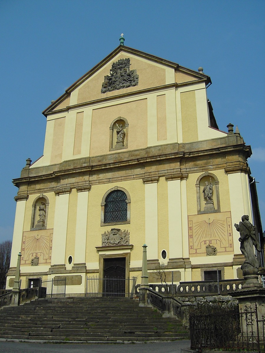 Kostel svatého Mikuláše (2007)